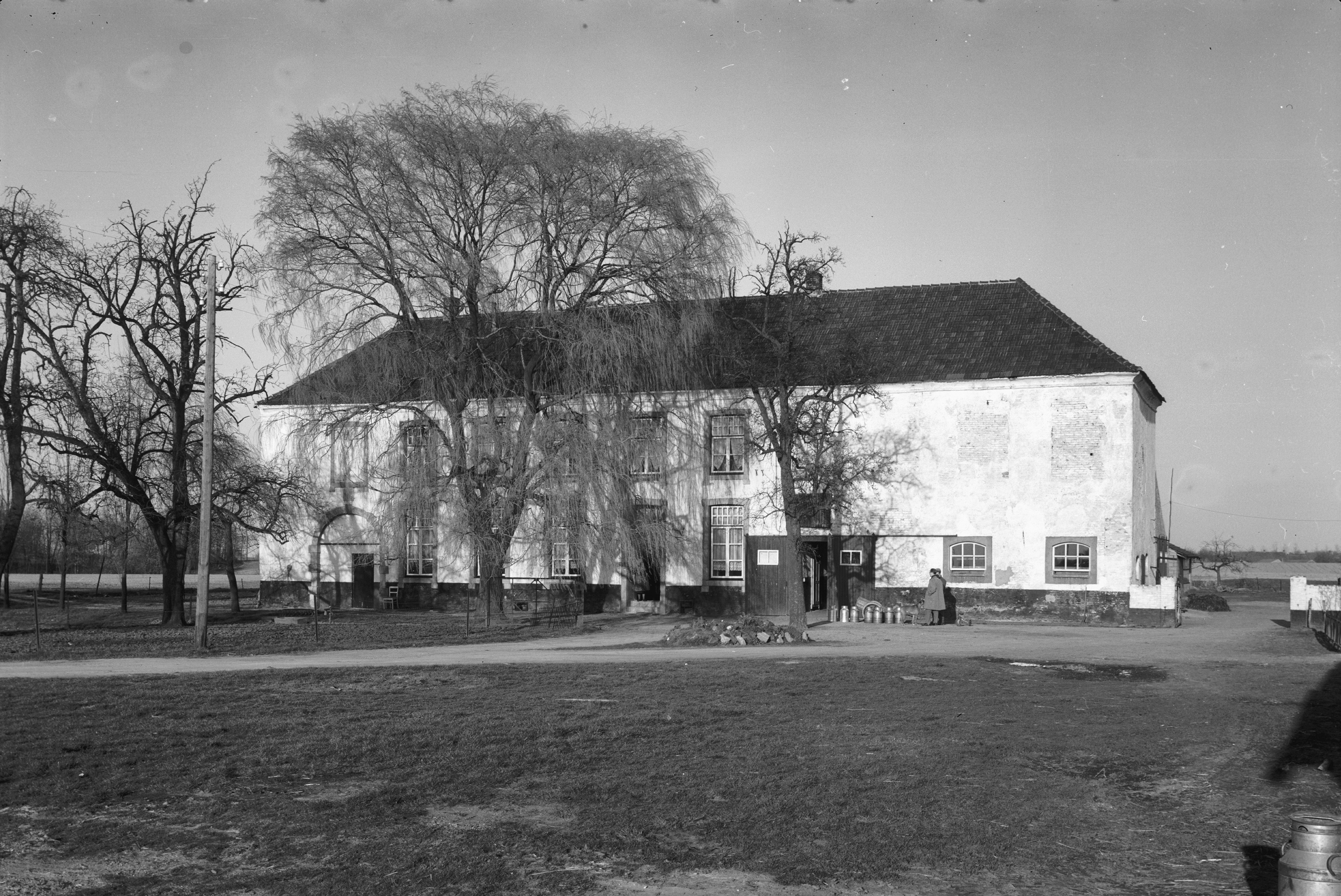 Diversen: voormalige Klooster, Keizerbosch 80, aanzicht